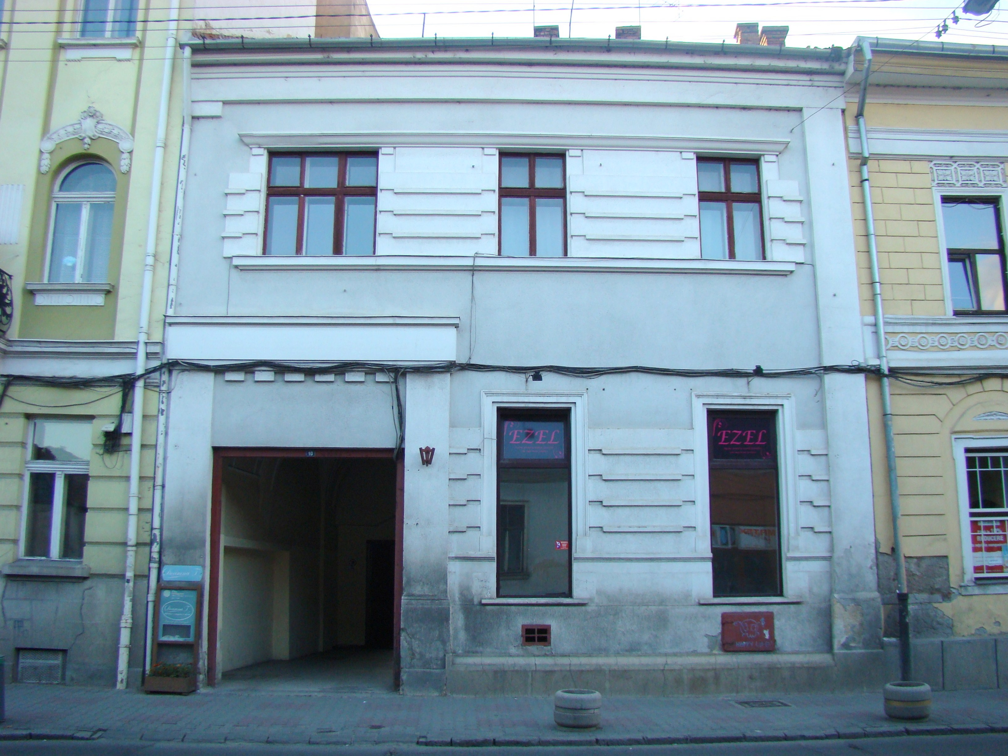 Clădire monument istoric, str. Napoca 10